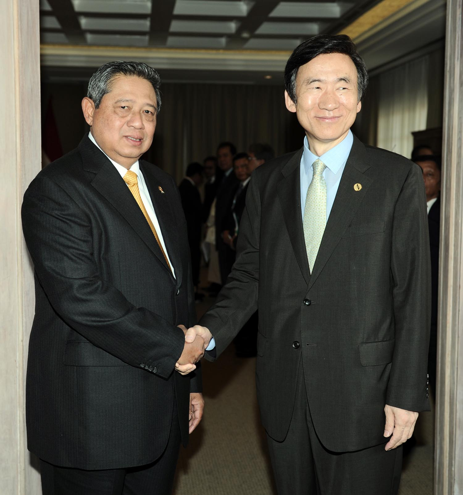 SBY menerima kunjungan menteri luar negeri Korea Selatan, Yun Byung-se di Bali, 14 Juni 2013